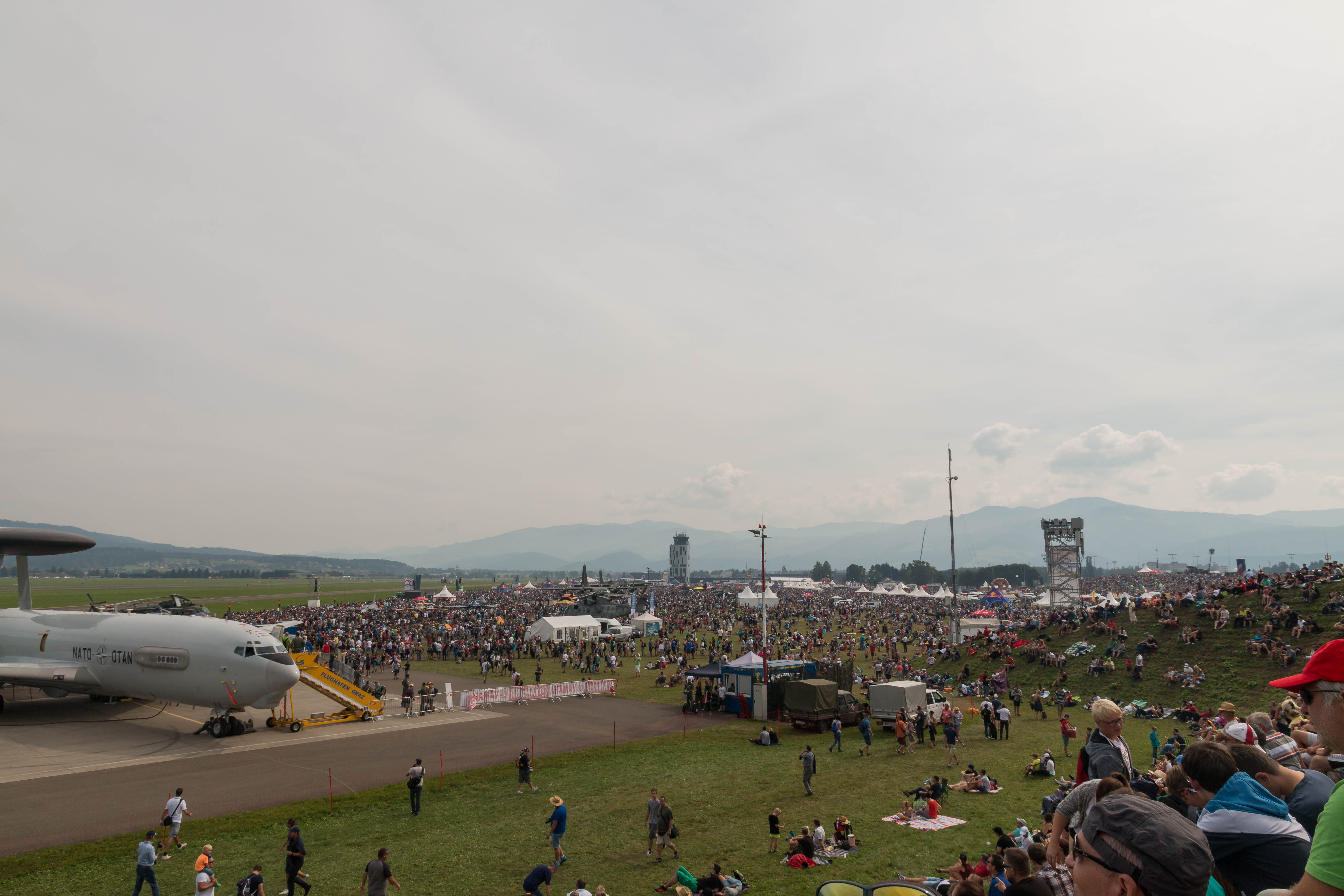 Airpower 2016